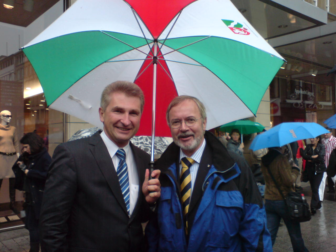 Andreas Pinkwart, Minister für Innovation, Wissenschaft, Forschung und Technologie sowie Stellvertretender Ministerpräsident des Landes Nordrhein-Westfalen und Werner Hoyer, Bundestagsabgeordneter der FDP und Außenpolitischer Sprecher der FDP-Bundestagsfraktion